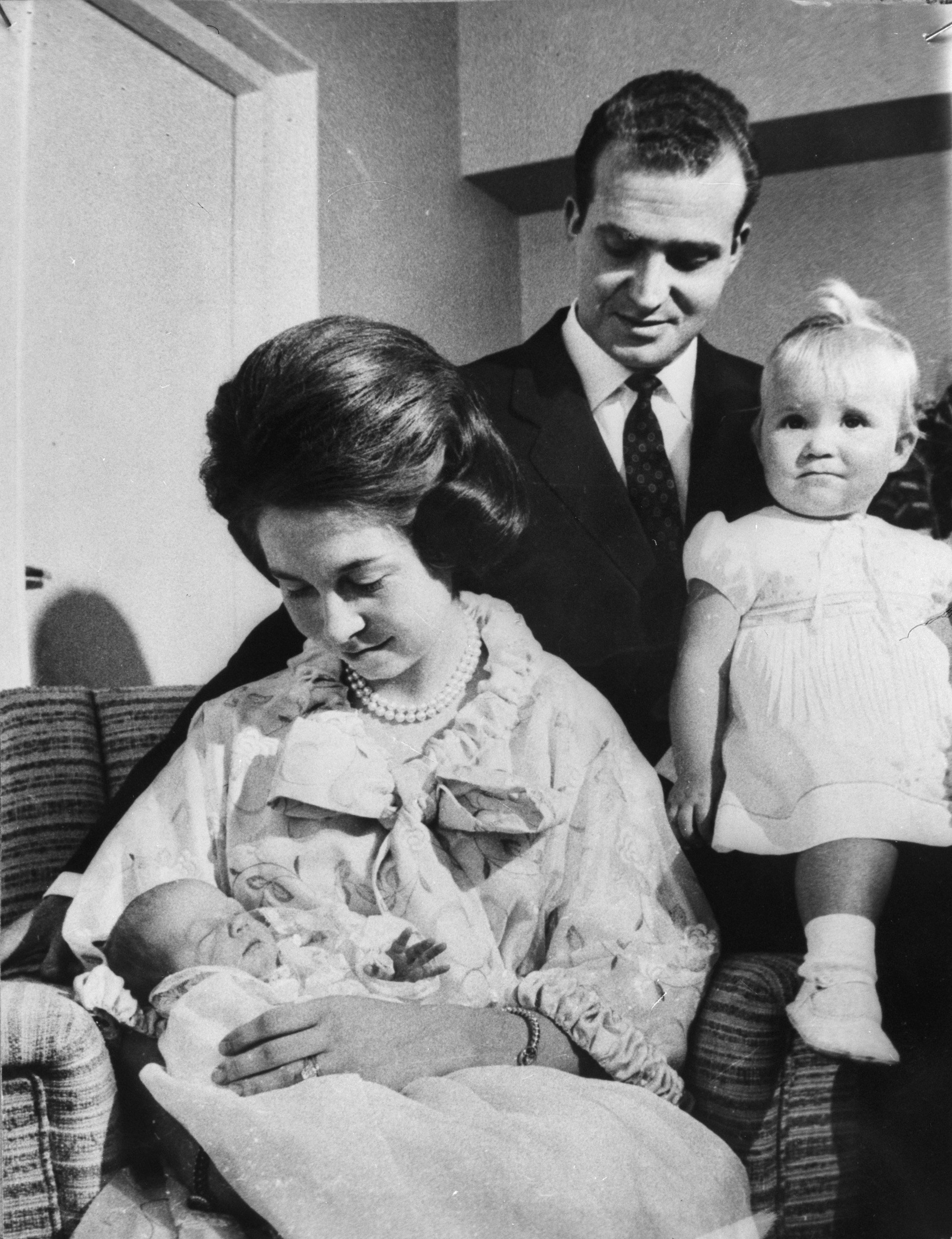 Collectie / Archief : Fotocollectie Anefo Reportage / Serie : [ onbekend ] Beschrijving : Prinses Sophie en Prins Juan Carlos met hun beide kinderen Datum : 17 juni 1965 Trefwoorden : Kinderen Persoonsnaam : Juan Carlos, prins van Spanje, Sofia, prinses van Griekenland Fotograaf : [onbekend] Auteursrechthebbende : Nationaal Archief Materiaalsoort : Negatief (zwart/wit) Nummer archiefinventaris : bekijk toegang 2.24.01.04 Bestanddeelnummer : 917-8749 Reacties Geplaatst door Royalfan op 17 juli 2017 - 21:52. prinses Elena Maria (20-12-1963) en (baby) prinses Cristina Frederica (13-06-1965)